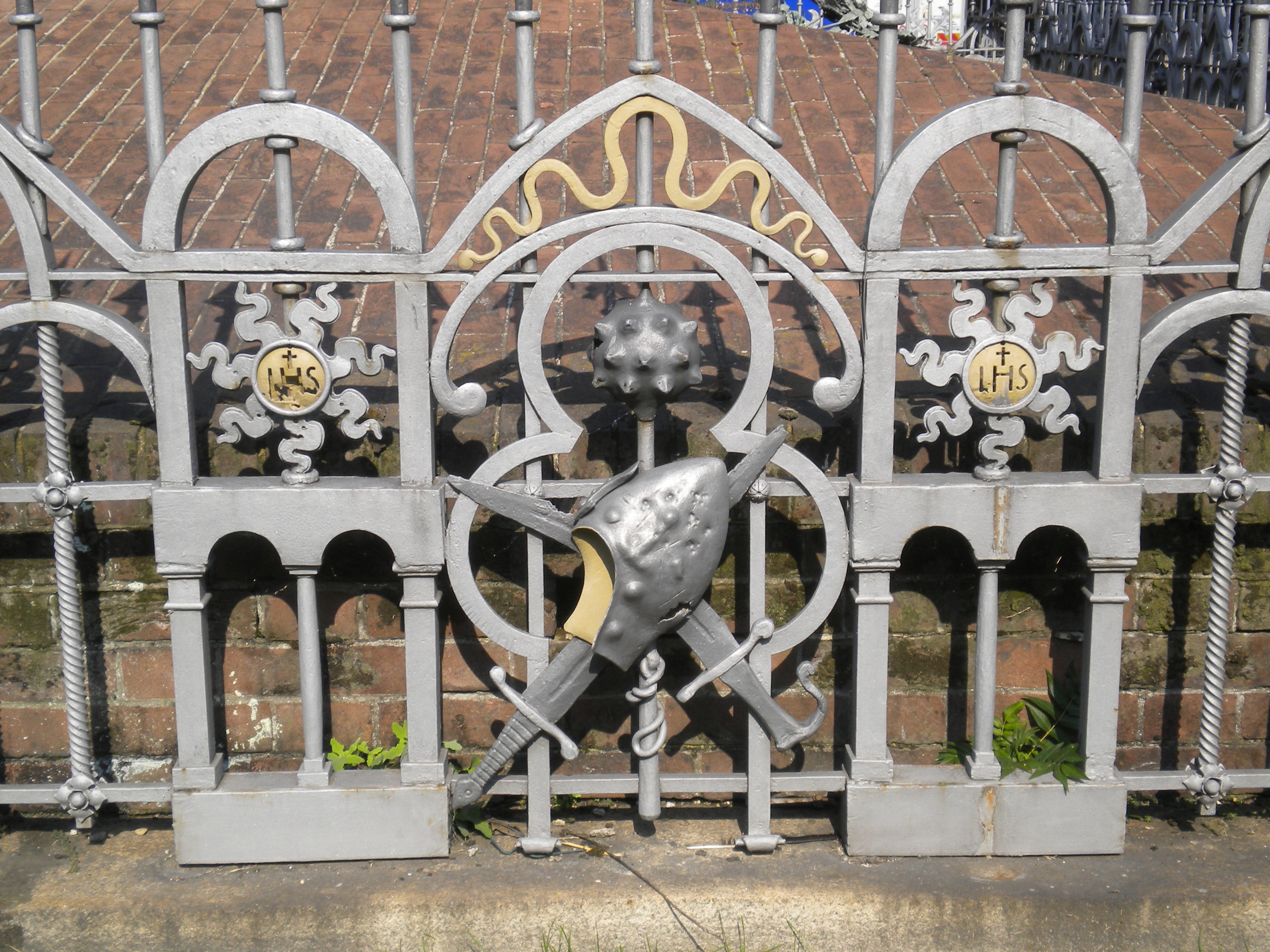 Monumento "Alberto da Giussano" This is a photo of a monument which is part of cultural heritage of Italy.